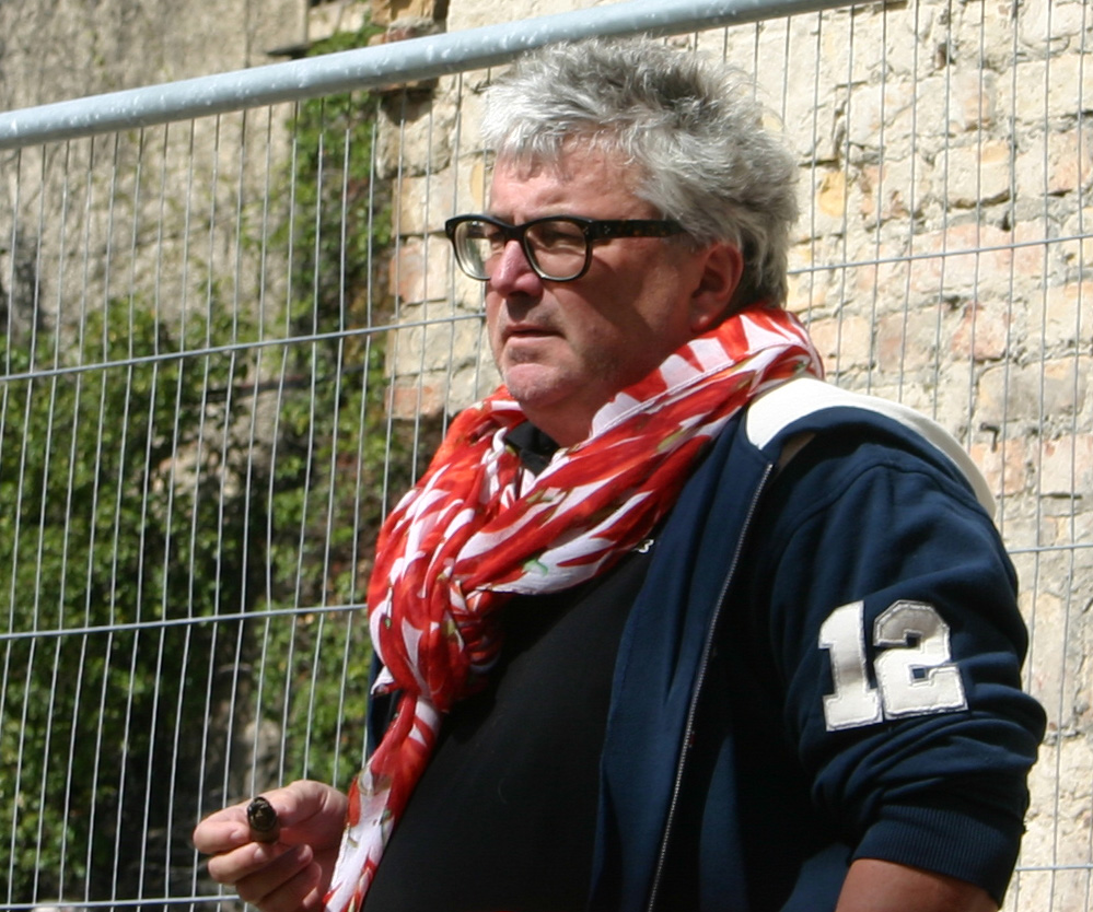 Der Unternehmer Hans Georg Näder (Otto Bock Healthcare) auf der Baustelle der Bötzow-Brauerei, die ihm seit 2010 gehört.